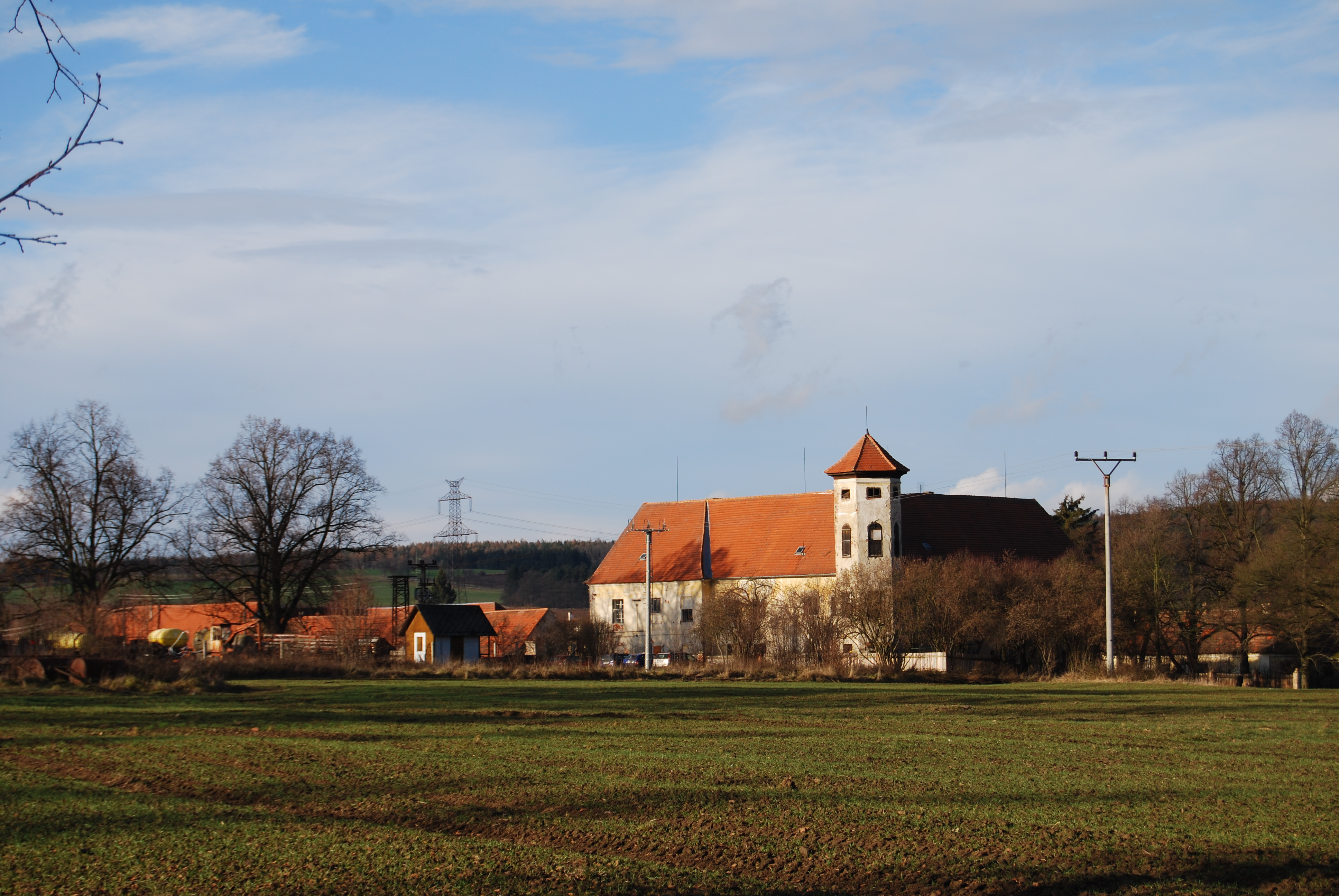 Celkový pohled na zámek a obec Rakovice. Okres Písek. Česká republika.